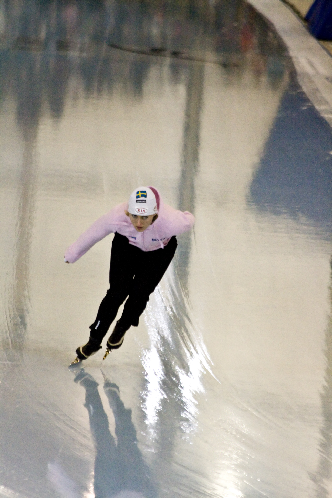 Paulina Wallin